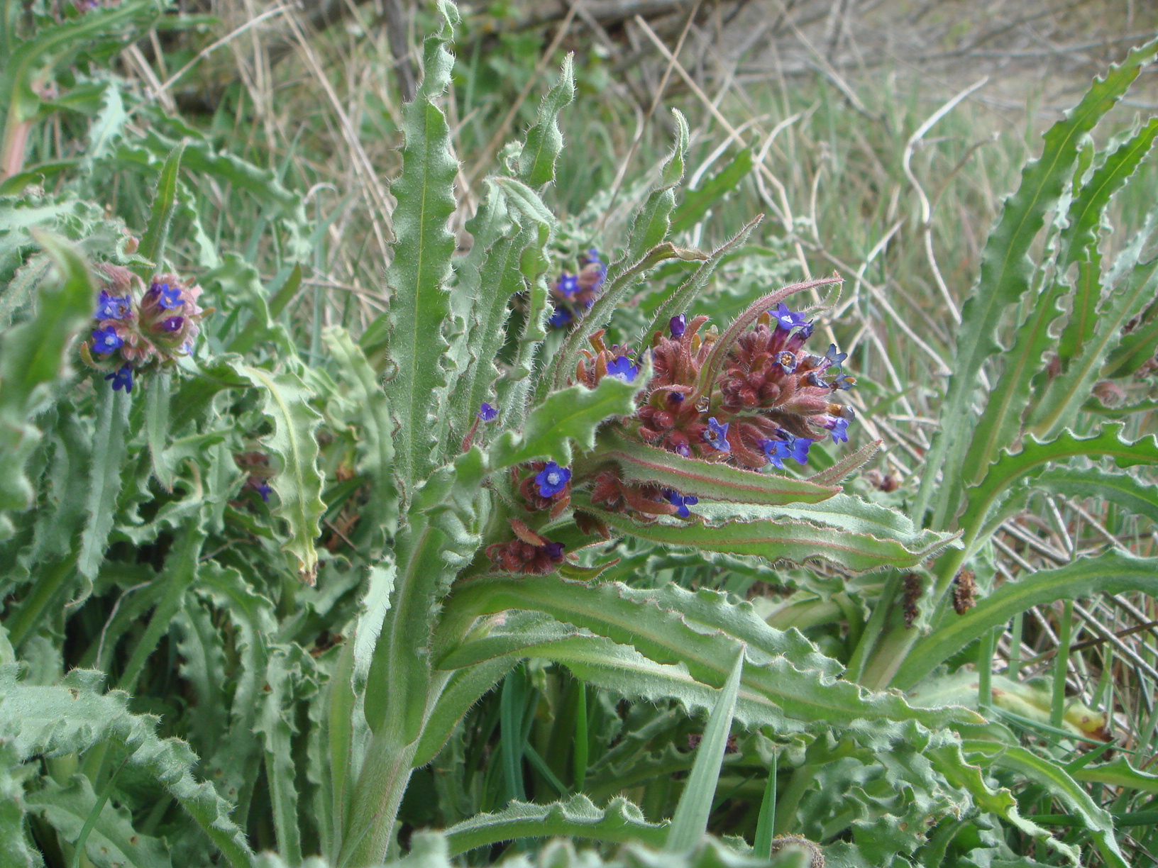 Anchusa undulata subsp. hybrida Ten, La Torre (Ávila), España